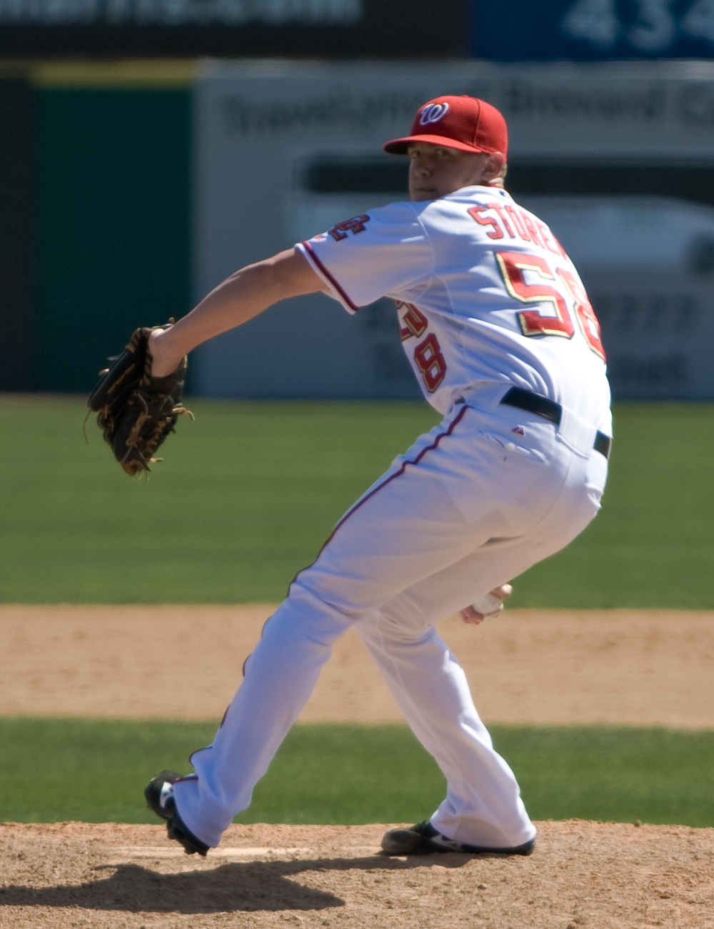 Drew Storen